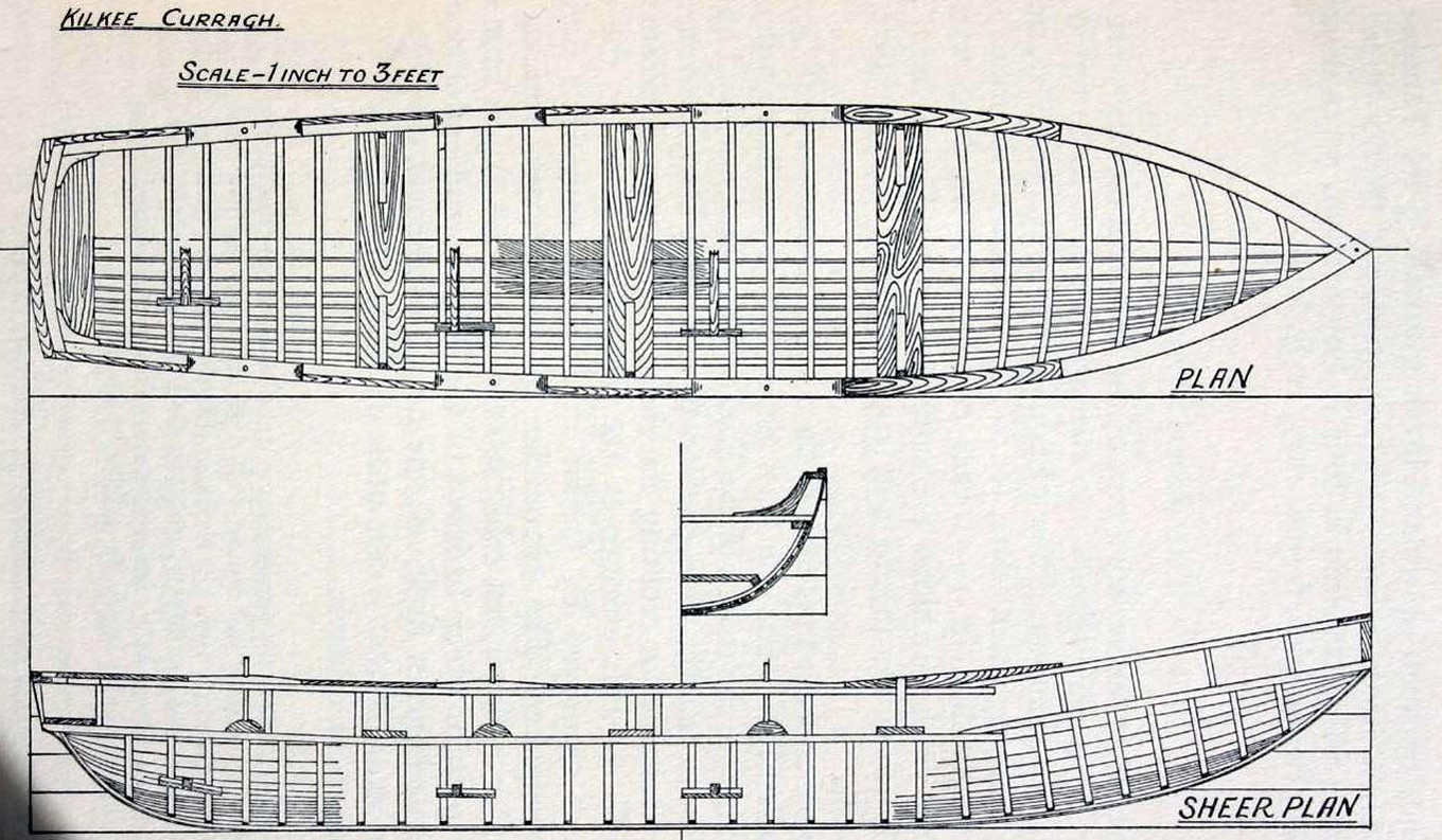 Теоретический чертёж каное Килки(З.Клэр)